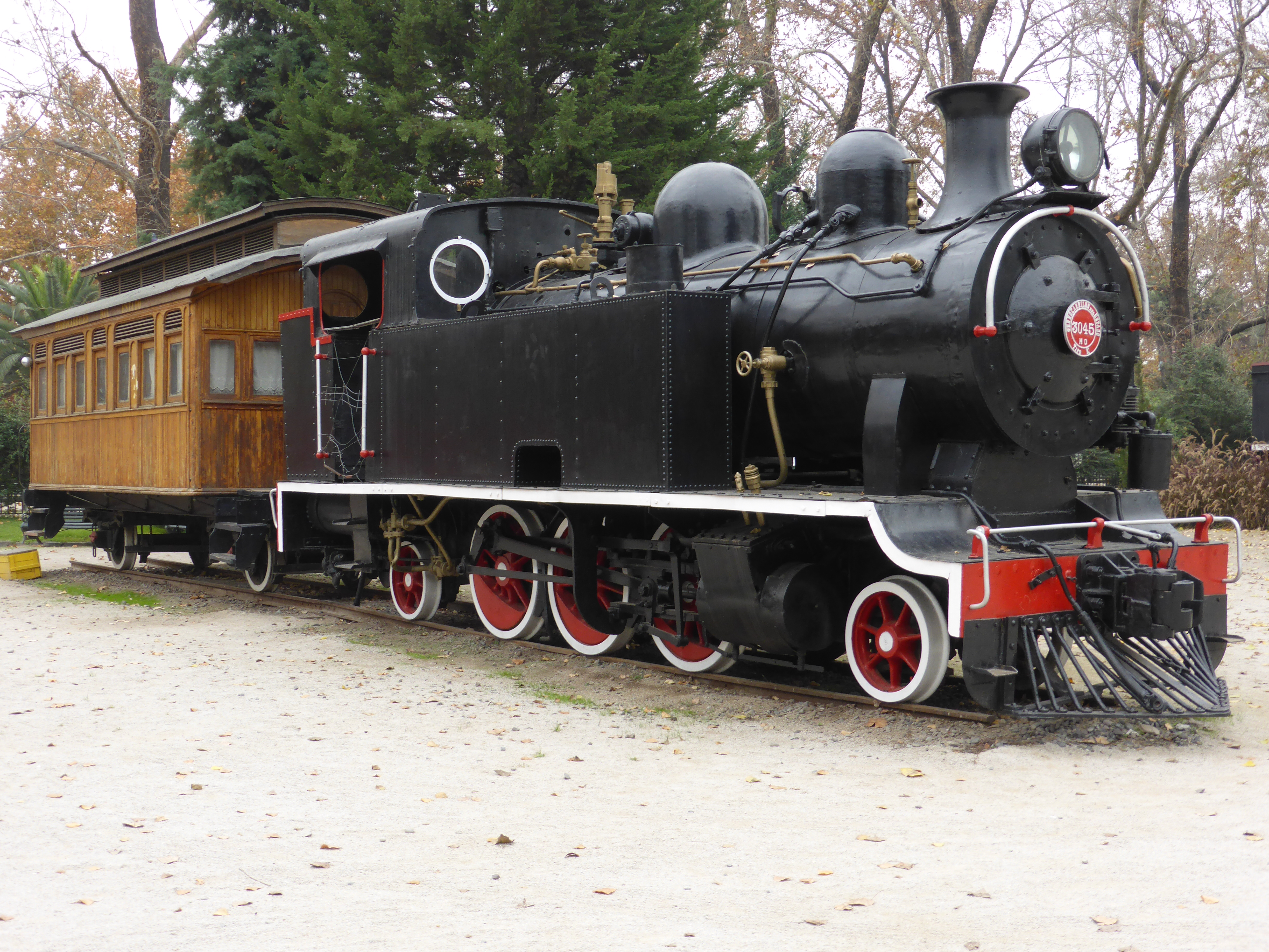 Locomotora de vapor de trocha métrica (para vía de 1 metro de ancho), fabricada en Alemania por Borsig en 1906. Red Norte. Trabajó en el Norte Chico, en Chile, entre Coquimbo y La Serena. Número 3045 de Ferrocarriles del Estado, asignada a la Maestranza de Ovalle. A continuación le sigue un coche de viajeros, de madera, de un ferrocarril salitero de Iquique, de diseño británico.